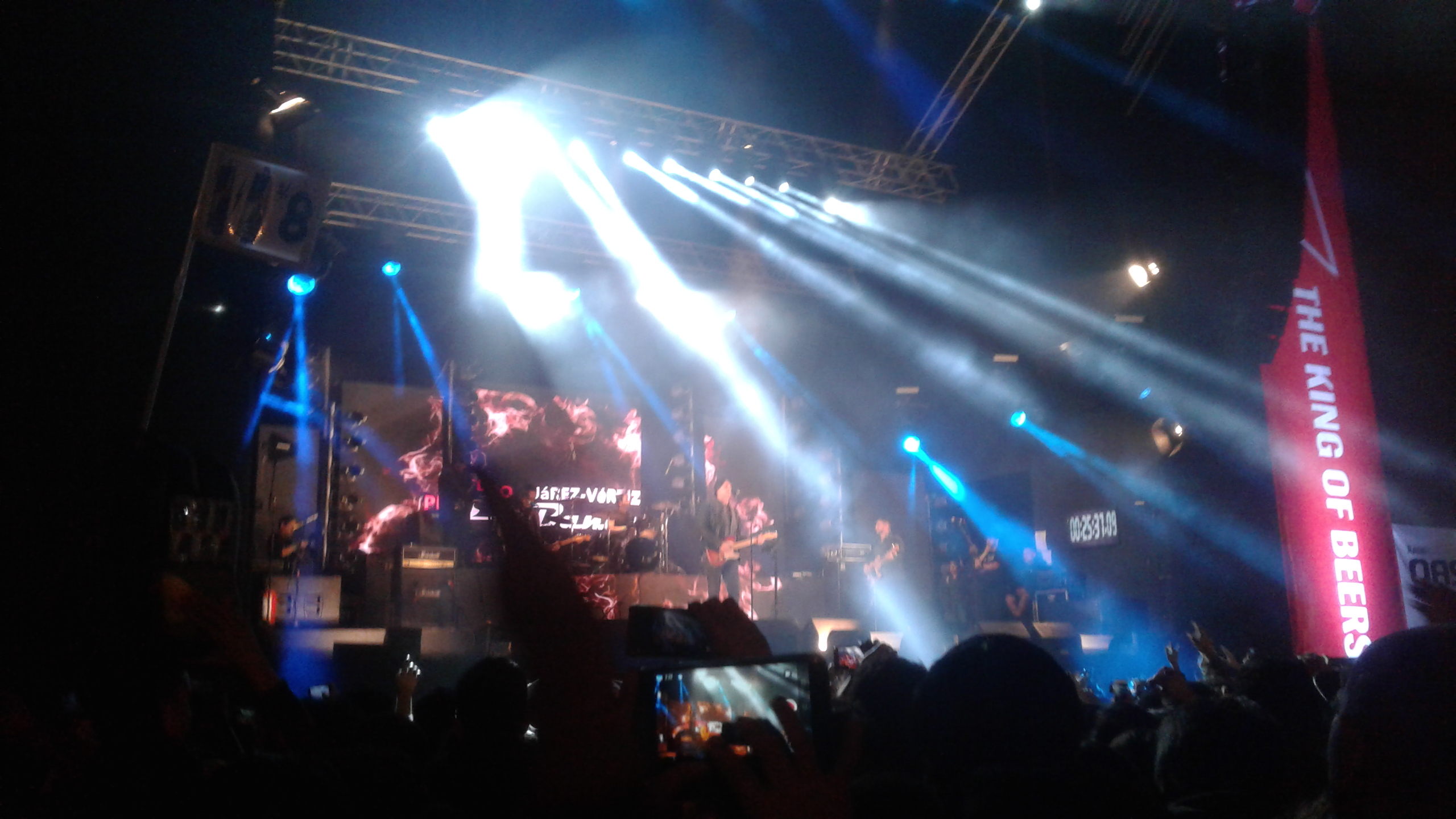 La Banda oficial de Pedro Suárez-Vértiz en vivo, 2018.